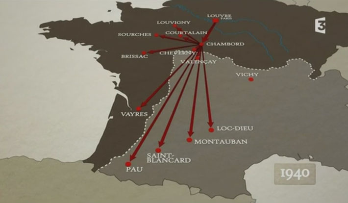 Carte de France en 1939-1940 montrant le transport des collections du Louvre à partir du château de Chambord.